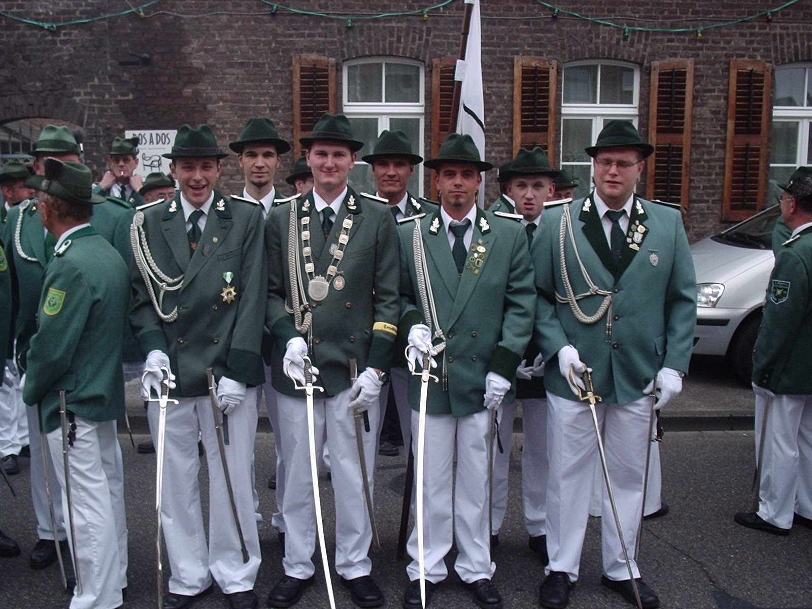 Scheibenschützen Dormagen